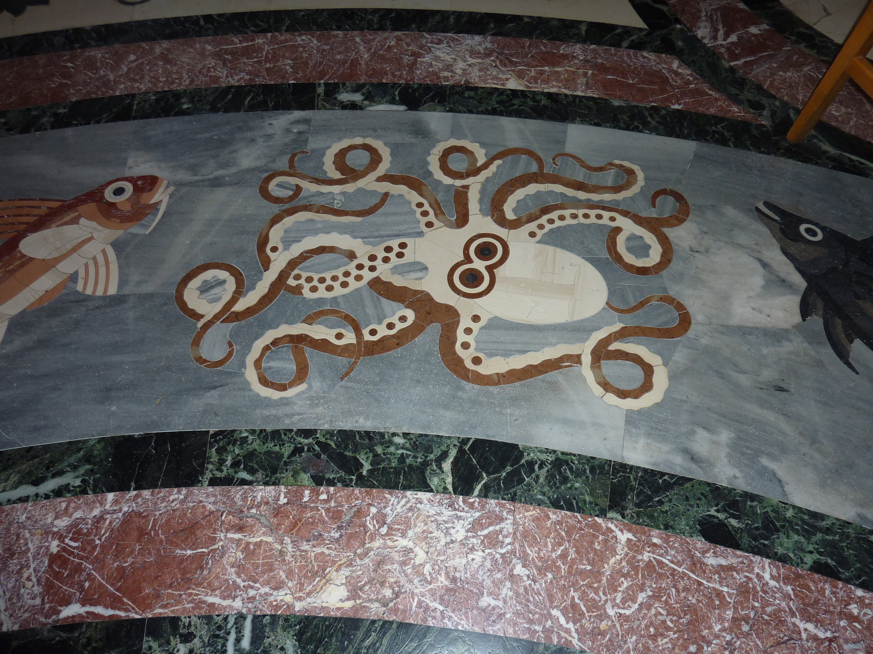 Boden in Hagios Andreas, Patras